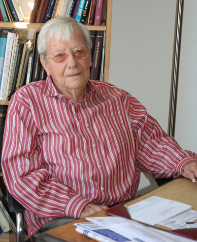 Nico Bloembergen thuis in Tucson